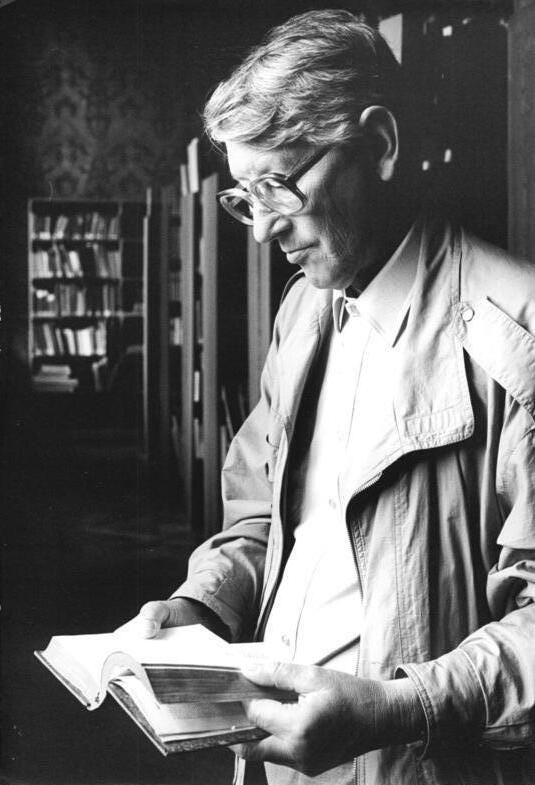 Weimar, Leiter der Zentralbibliothek, Hans Henning ADN-ZB Ludwig-28.7.89 Bez. Erfurt: "Faust"-Sammlung- Leiter der Zentralbibliothek der deutschen Klassik der Nationalen Forschungs- und Gedenkstätten Weimar ist Prof. Hans Henning. Die "Faust"-Sammlung mit ihren wertvollen alten Handschriften gehört zu dieser Bibliothek. Das Archiv besitzt z.B. aus der Zeit vor Goethe Dr. Johann Faust's magische Schriften in 12 Teilen und Zauberbücher wie "Höllenzwang" und "Praxis Magica", die ebenfalls Faust zugeschrieben werden. (siehe 6 und 7 N und ADN-Meldung)